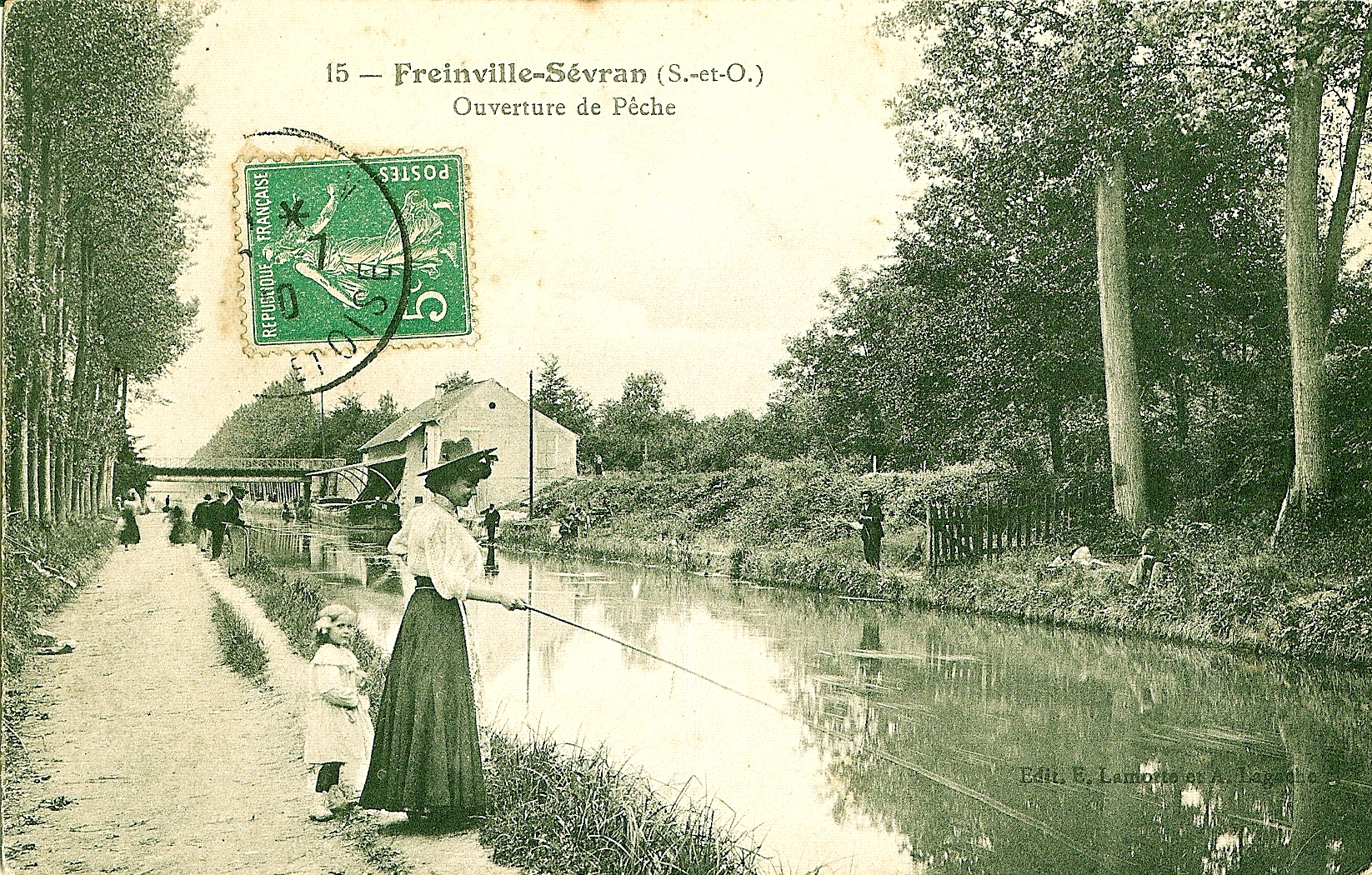 Carte postale ancienne éditée par Lamorte et Lagache, N°15FREINVILLE-SEVRAN : Ouverture de la pêche (sur le Canal de l'Ourcq)